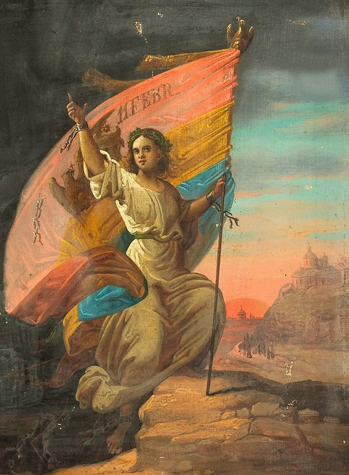 Gheorghe Tattarescu - 11 Februarie 1866 - România Modernă, semnată dreapta jos cu brun, ulei pe carton.